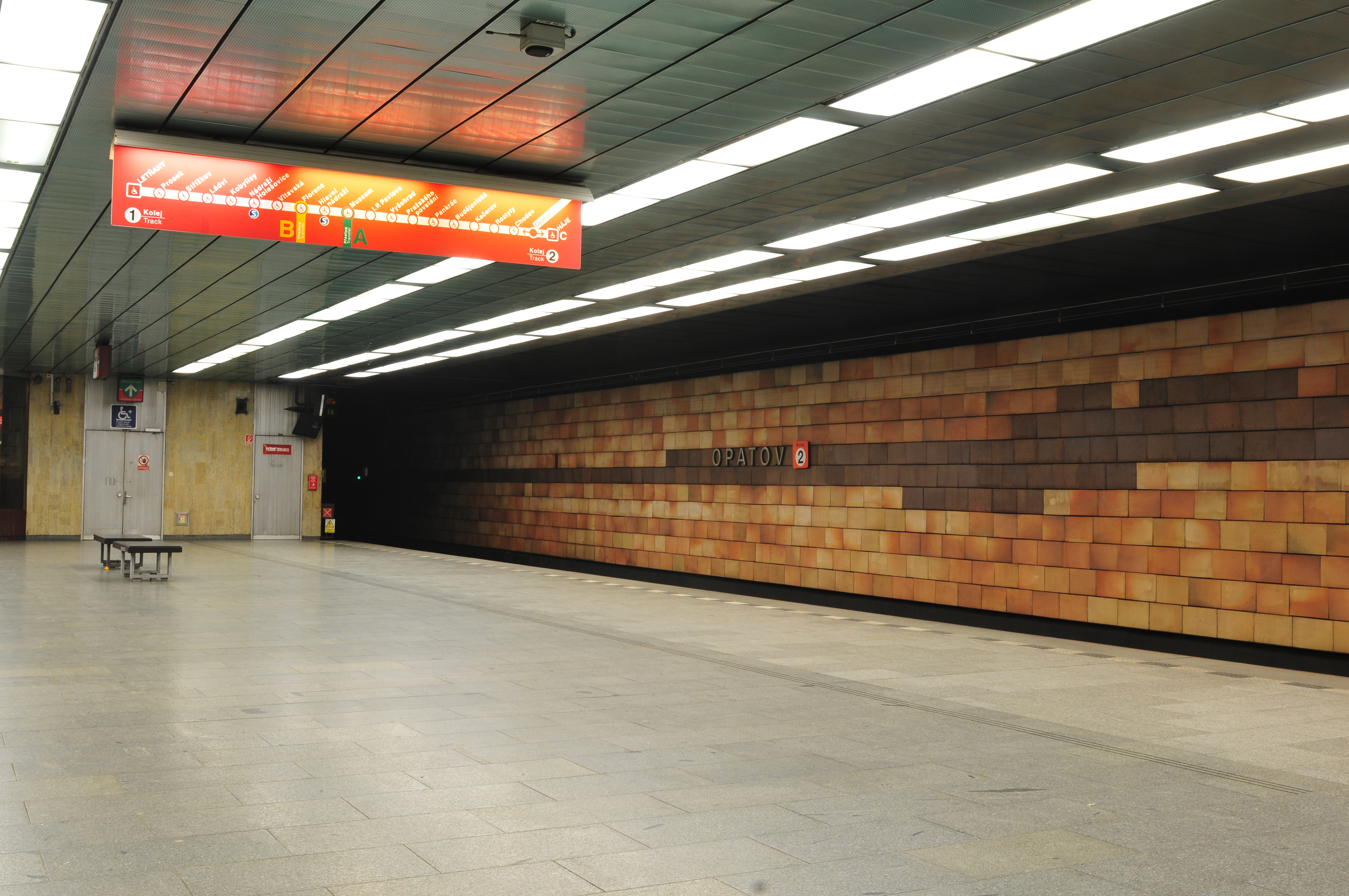 Metro Praha